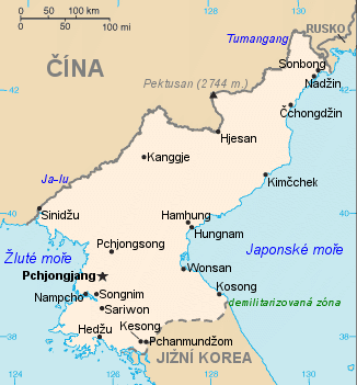 Orientační mapa Severní Koreje.